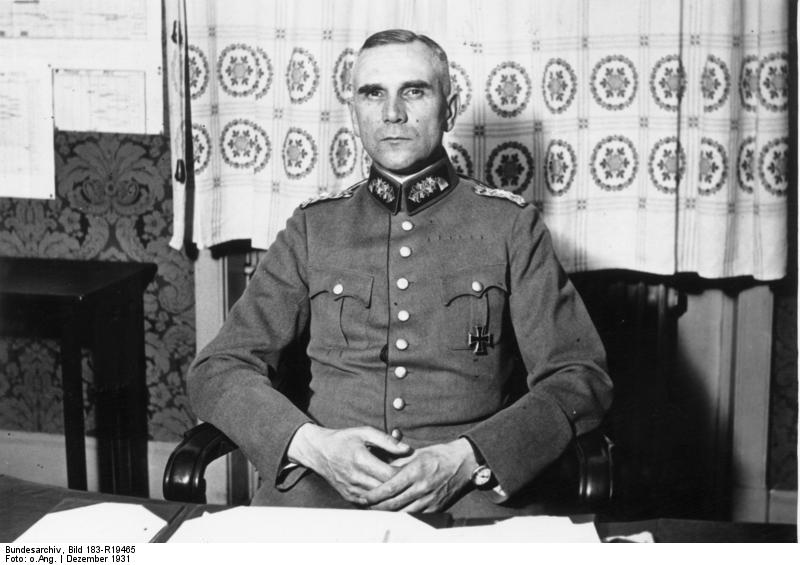 v.Liebmann, General, Wehrkreis V, 42249-31